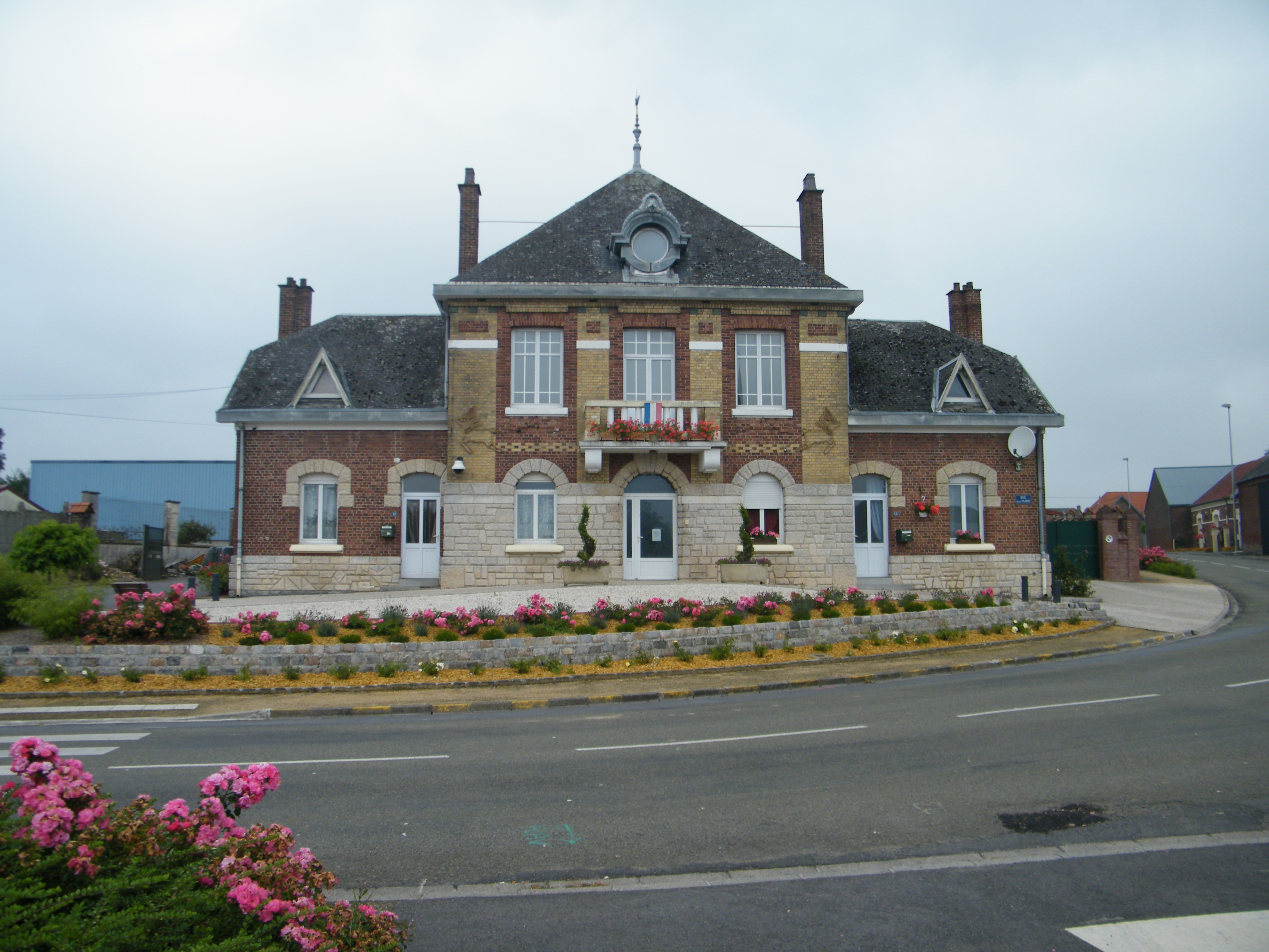 Mairie-école.